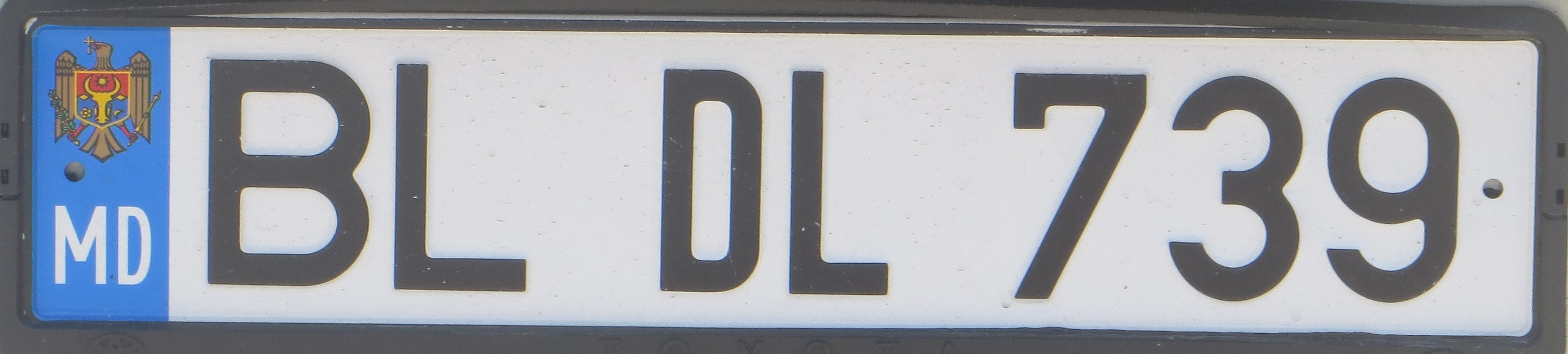 kentekenplaat Moldavië nieuw